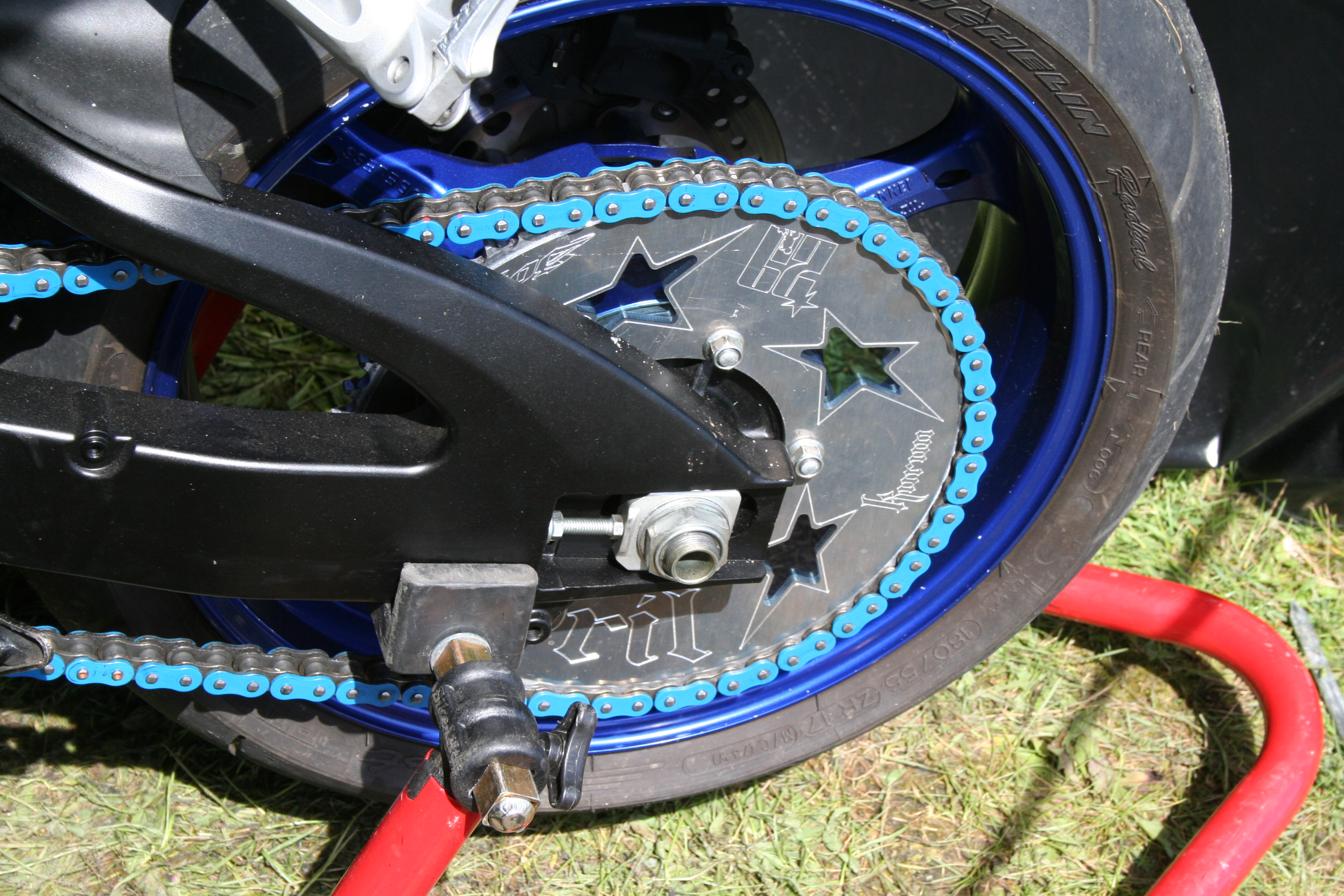 Couronne renforcée équipant une moto de stunt.